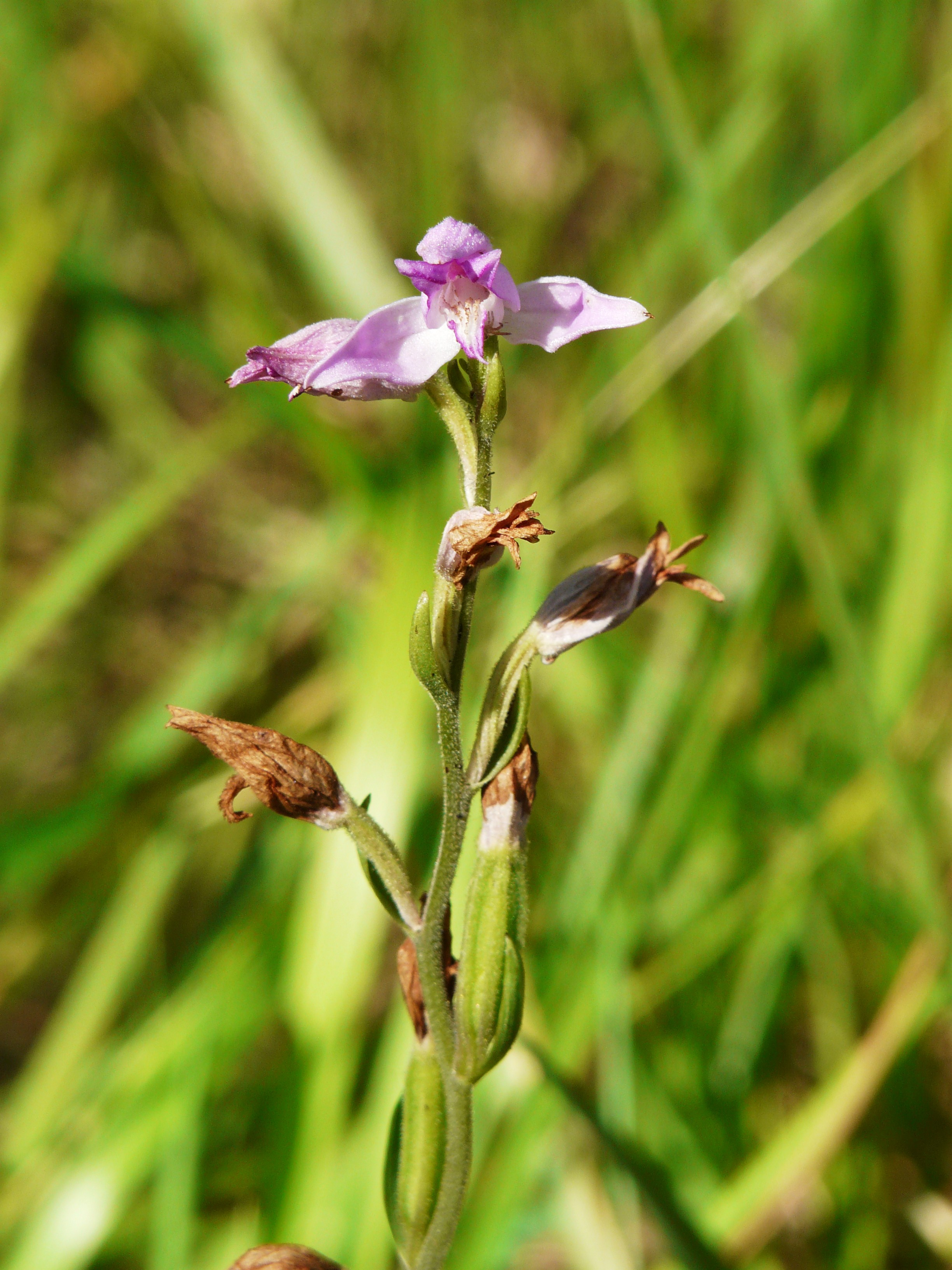 Céphalanthère rouge (Cephalanthera rubra), Trélissac, Dordogne, France